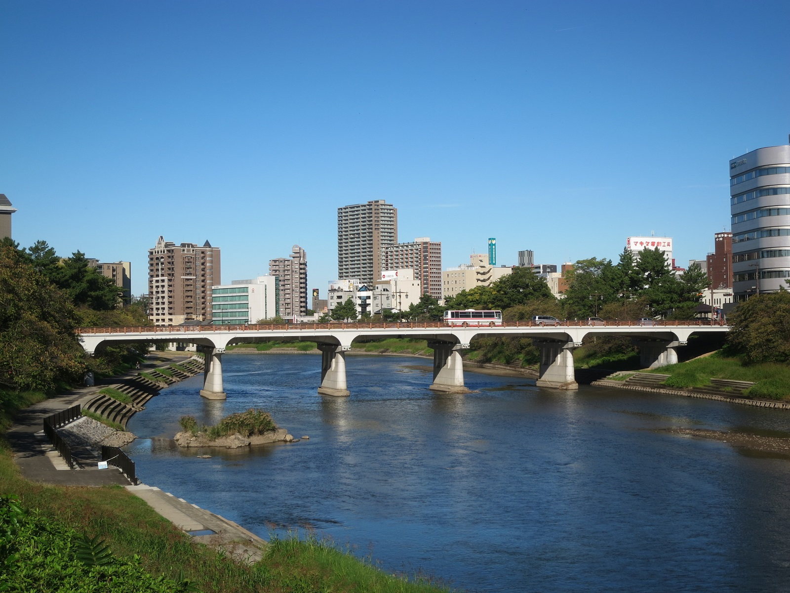 明代橋（愛知県岡崎市）